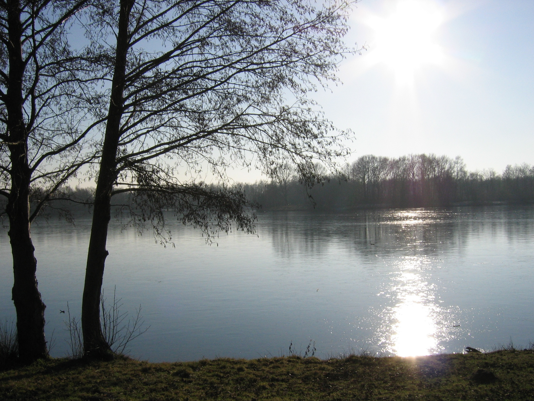 Torfmoorsee in Hörstel